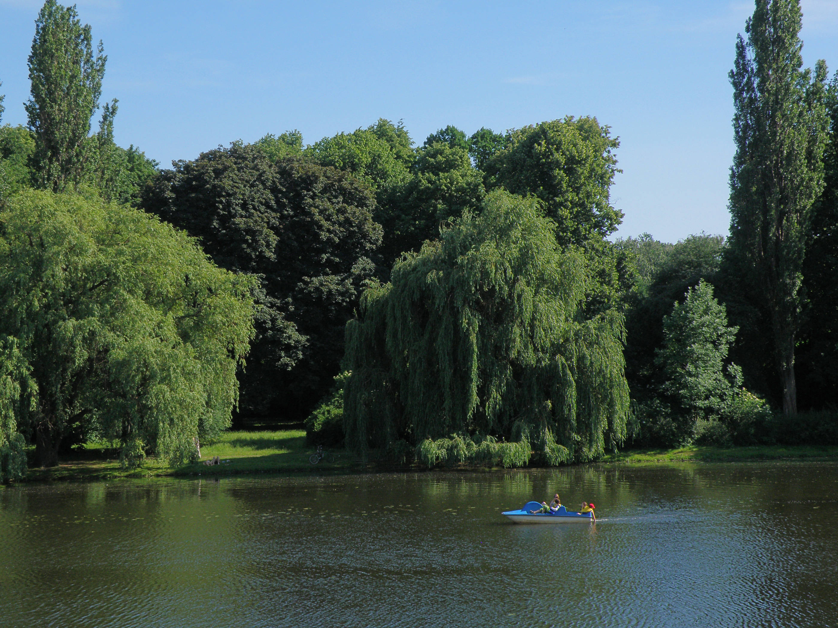 Park Skaryszewski, 1905-22 (875 z 13.12.1973), ul. Zieleniecka - Waszyngtona, Warszawa